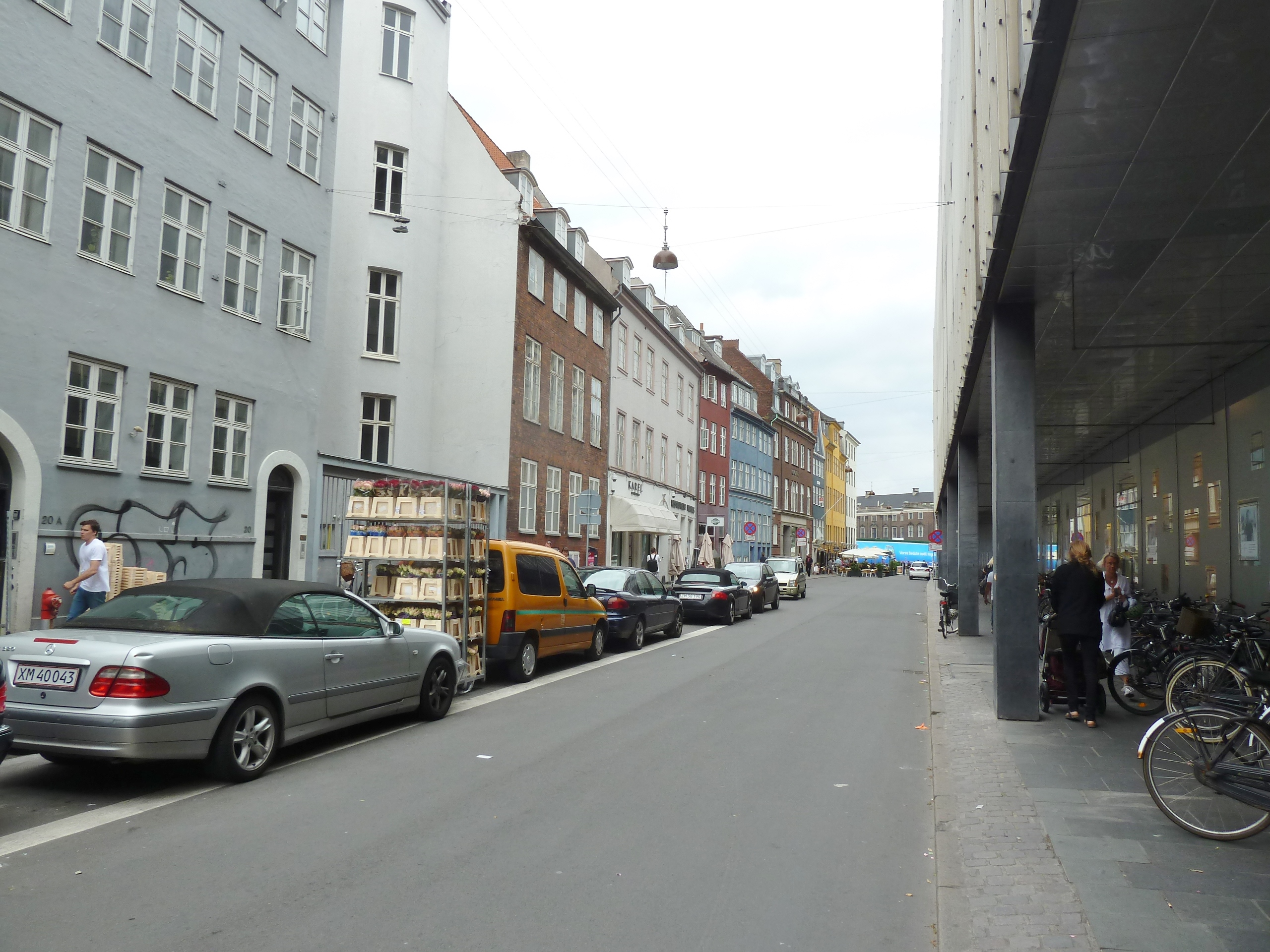 The street Lille Kongensgade in Indre By in Copenhagen.